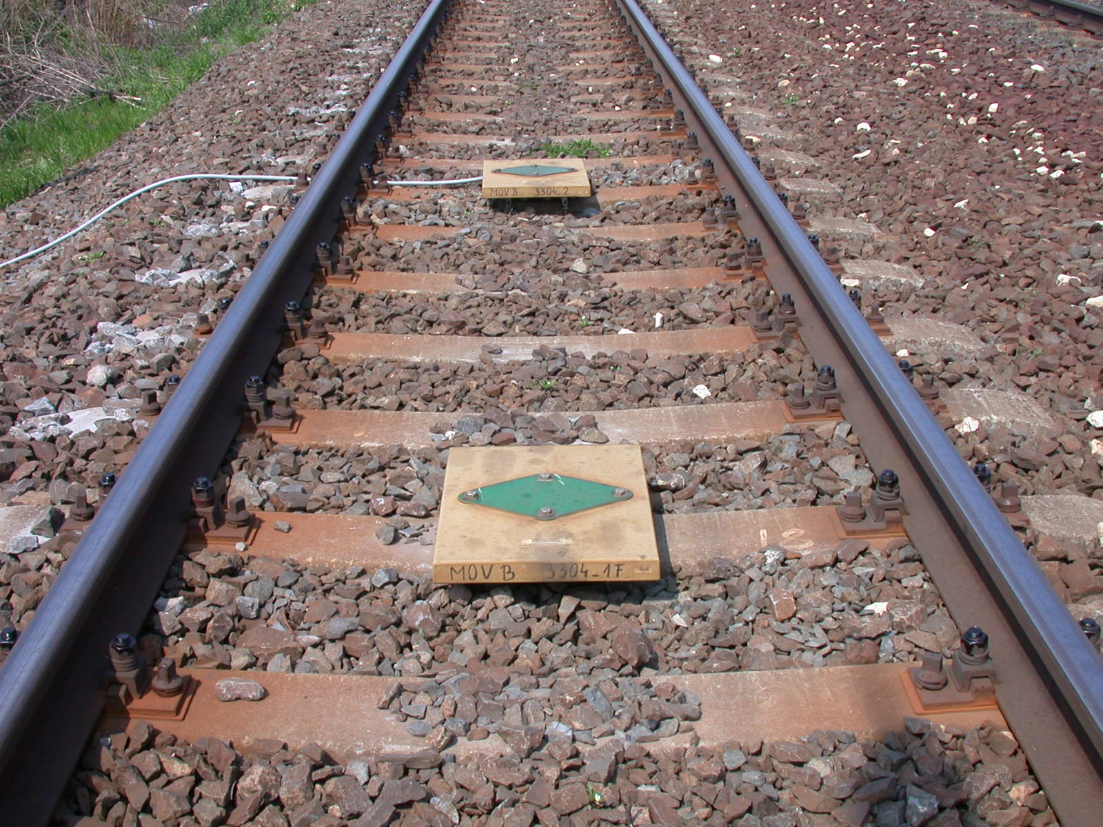 Balizok Mosonmagyaróváron